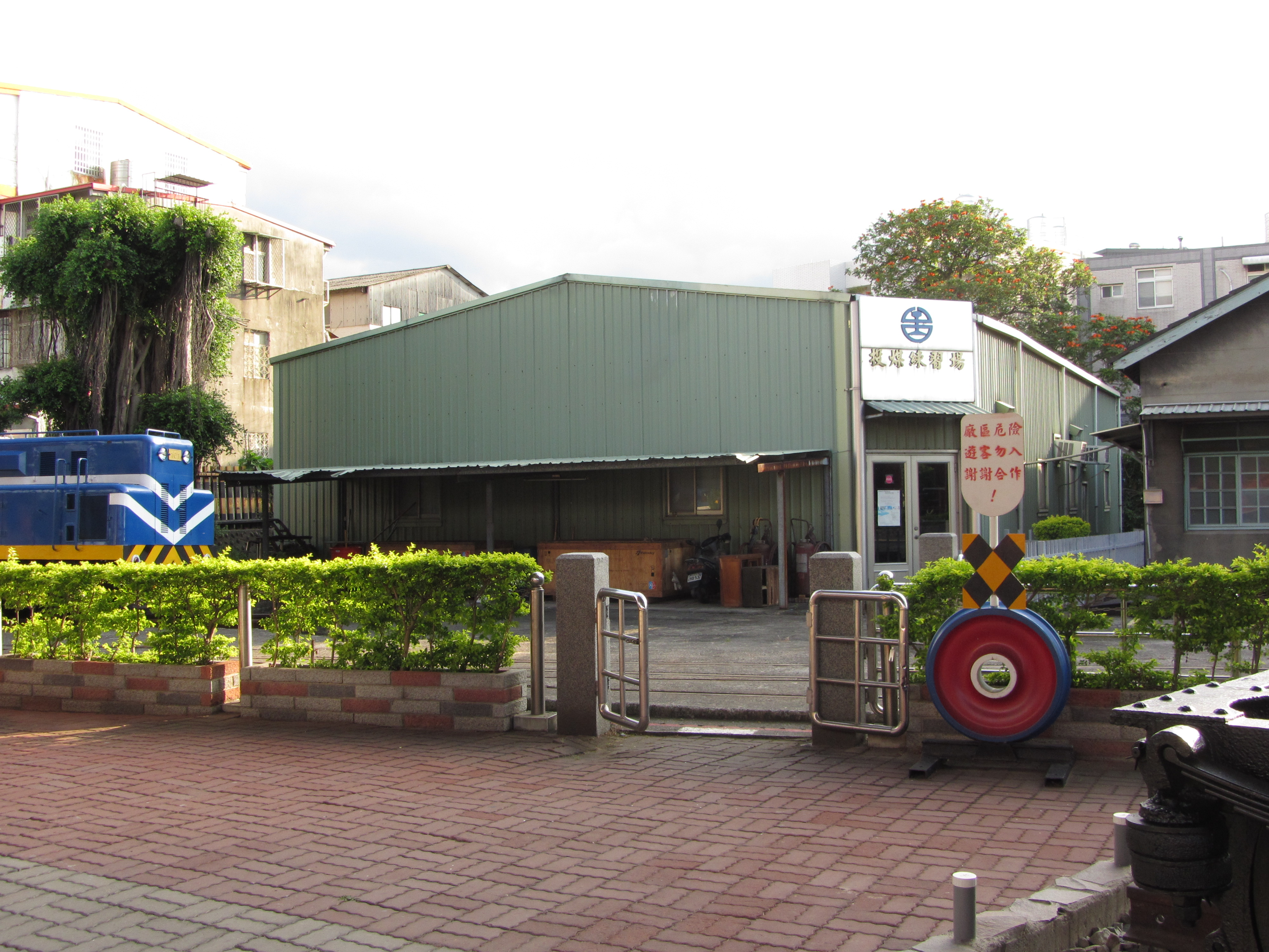 中文（台灣）: 苗栗鐵道文物展示館投煤練習場。